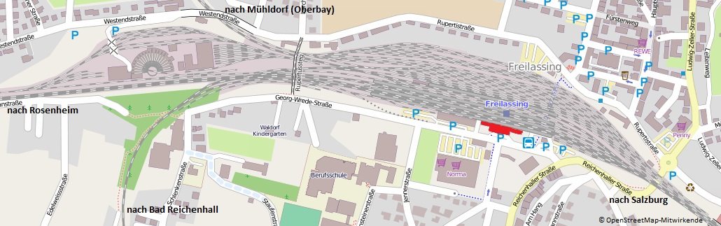 Übersichtskarte des Bahnhofs Freilassing 2014 This map may be incomplete, and may contain errors. Don't rely solely on it for navigation.